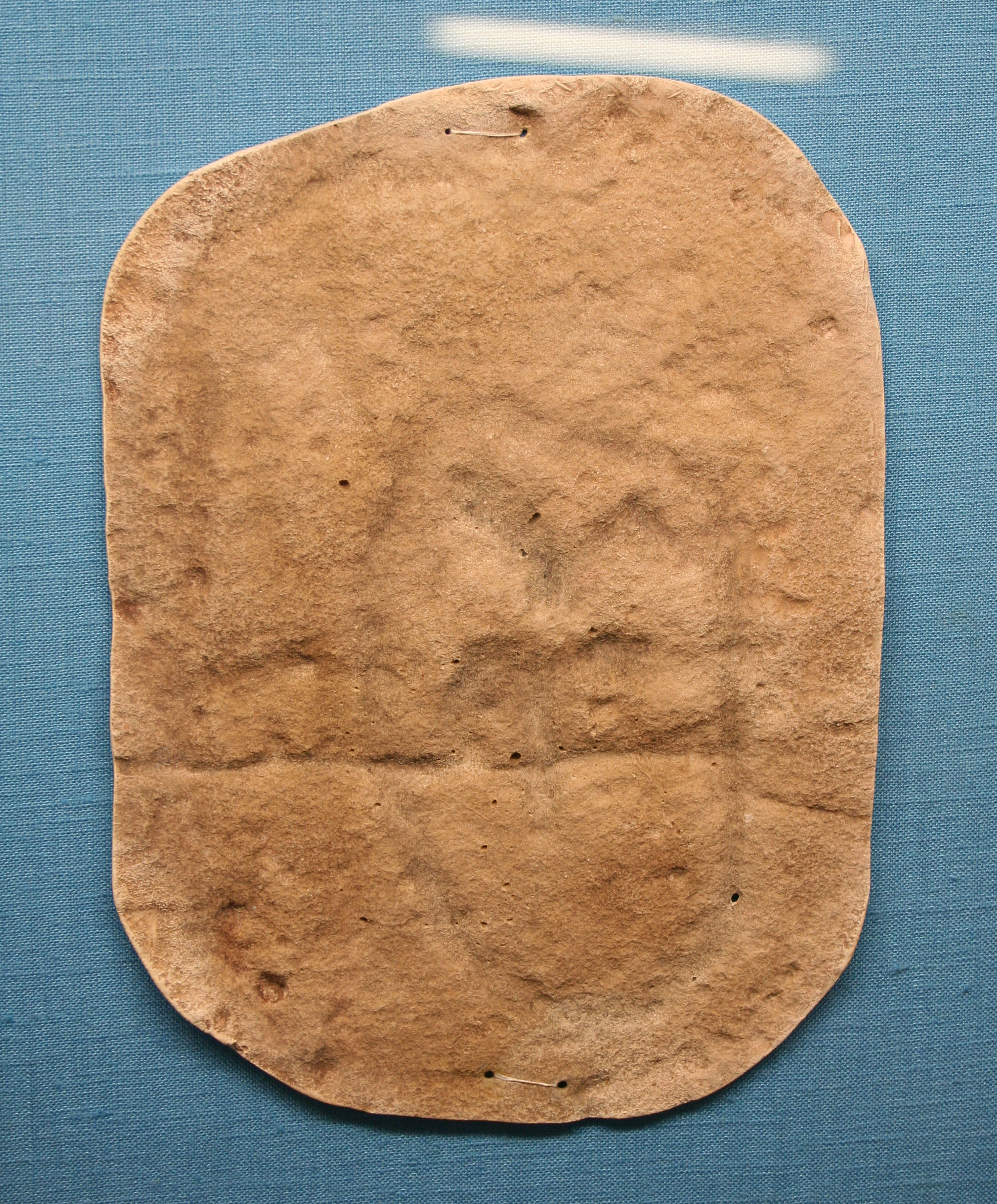 Abguss von einem Wandstein des Galeriegrabs von Züschen, Regionalmuseum Fritzlar